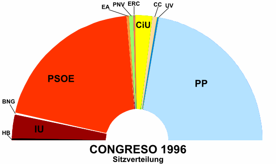 Sitzverteilung span. Abgeordnetenhaus 1996